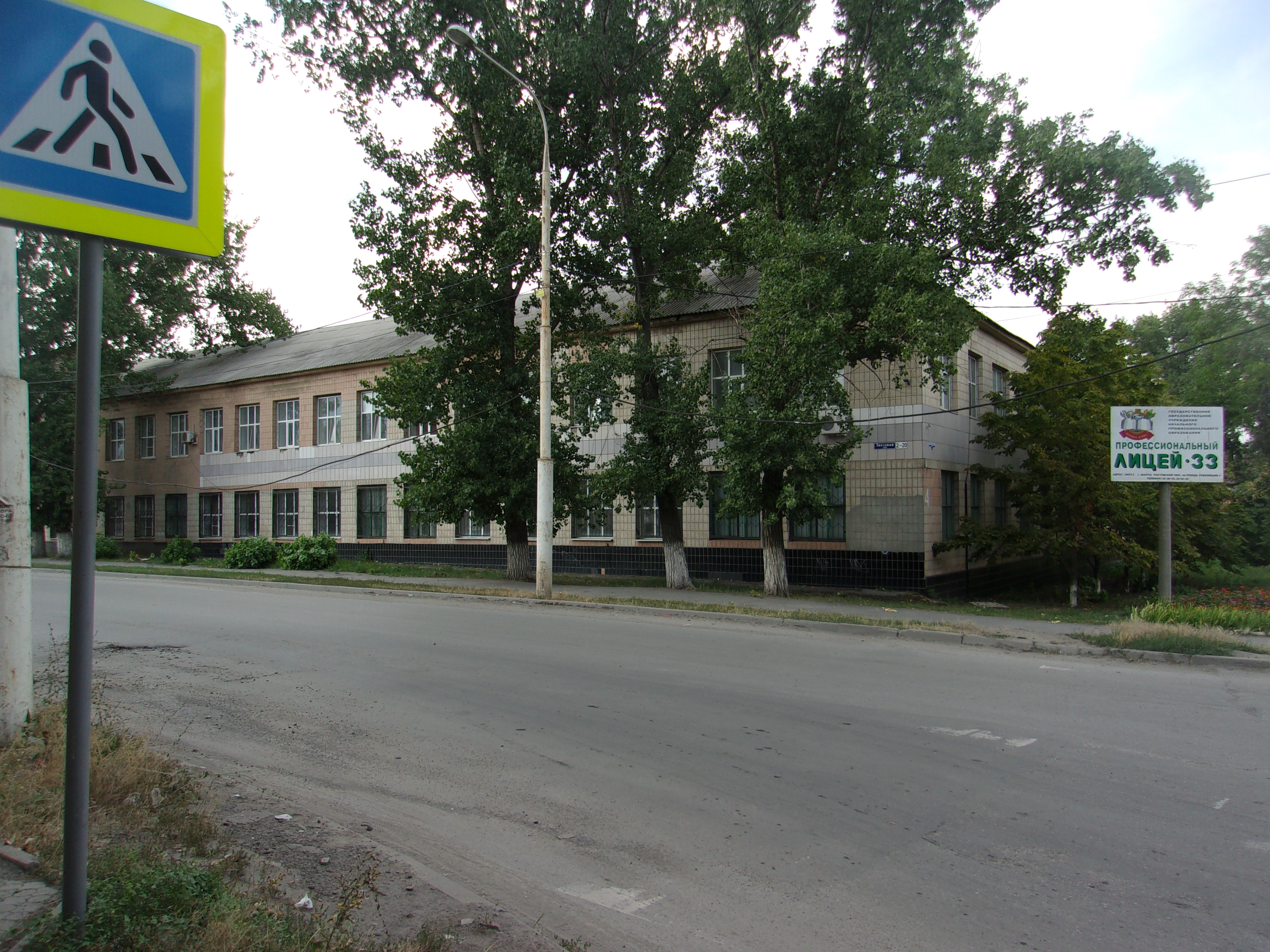 Профессиональный лицей №33 г. Шахты.